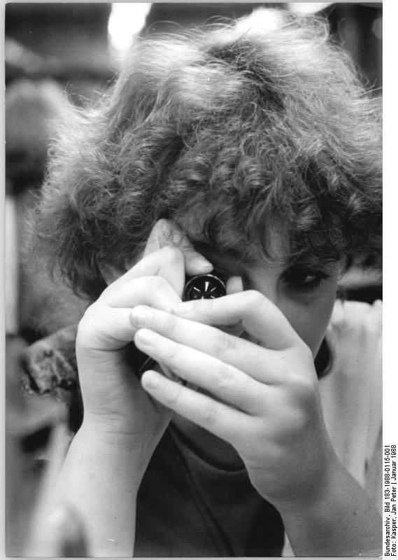 VEB Carl Zeiss Jena, Linsen ADN-ZB Kasper 15.1.1988 Bez. Gera: Linsen der verschiedensten Durchmesser und Brennweiten für optische Geräte aus dem Jenaer Zeiss-Kombinat erhalten in der Poliererei des Optik-Betriebes ihren "letzten Schliff". Neben einer ständig steigenden Produktion von Erzeugnissen des klassischen Optikprogramms hat sich die Fertigung von Optik-Bauteilen für lithografische Geräte in den vergangenen zwei Jahren verdoppelt. Solche Anlagen sind Bestandteil technologischer Spezialausrüstungen für die Herstellung mikroelektronischer Bauelemente. Dabei werden optische Systeme benötigt, deren Funktionsflächen zum Teil nicht mehr als ein Fünfzigtausendstel Millimeter vom Ideal abweichen. Hohe Präzision verlangt ständige Kontrolle der optischen Bauteile beim Polieren. Cornelia Kinzel ist Lehrling im zweiten Lehrjahr. Sie erlernt den Beruf des Feinoptikers.